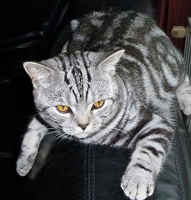 Een Brits korthaar kater.